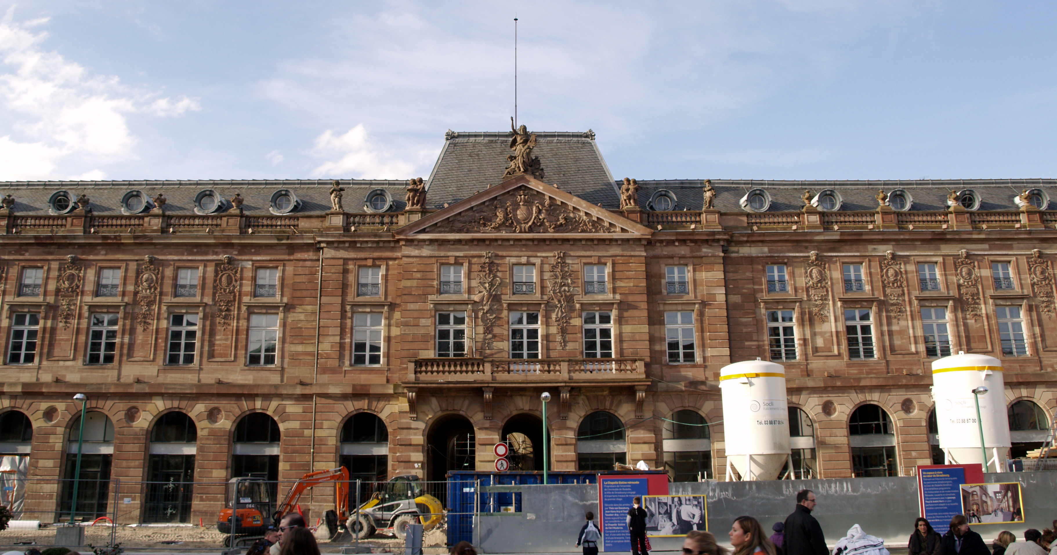 L'Aubette de Strasbourg